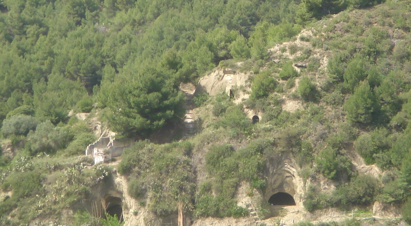 Wohnhöhle in Rabatana, Tursi